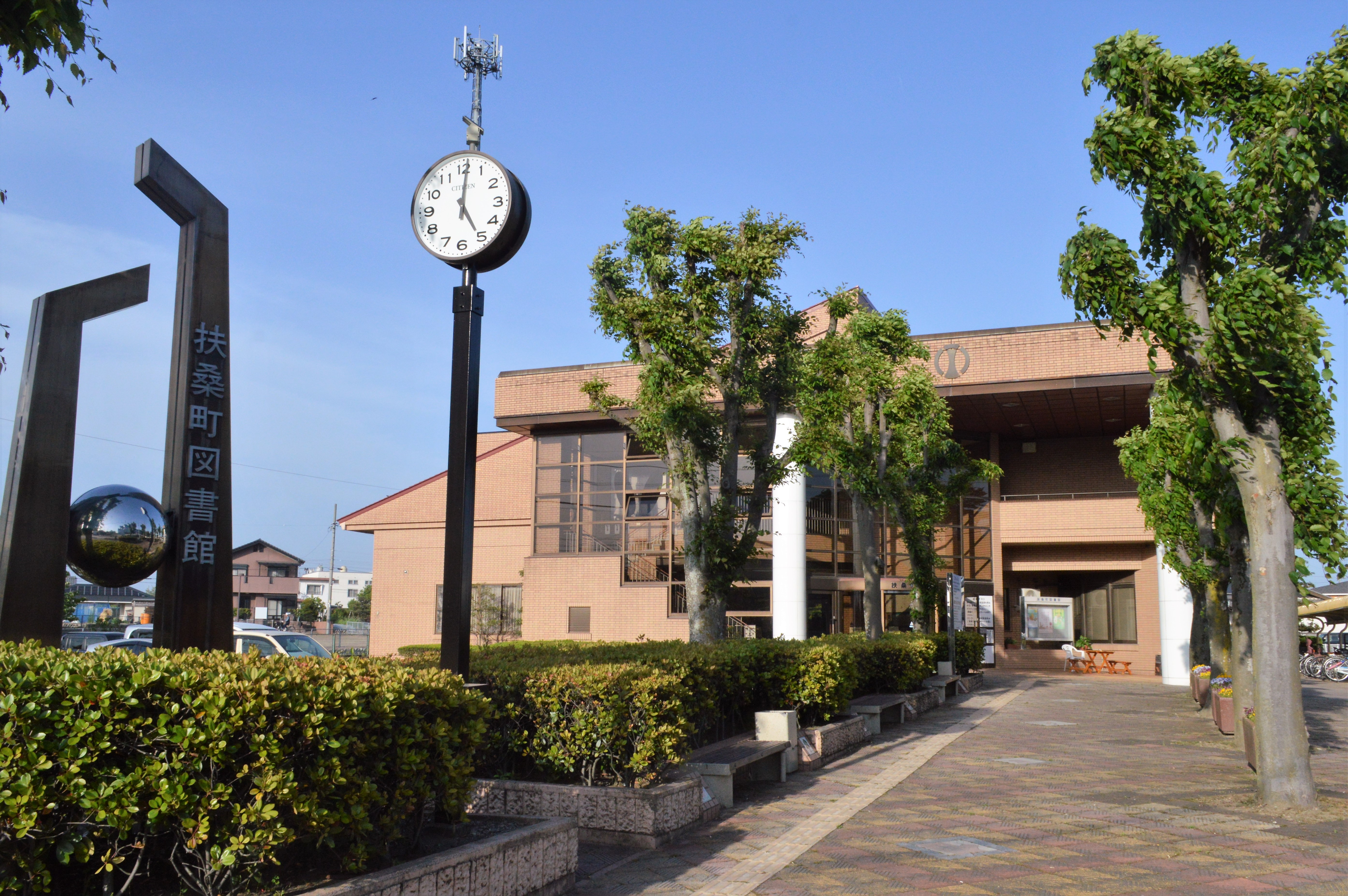 愛知県丹羽郡扶桑町の扶桑町図書館。